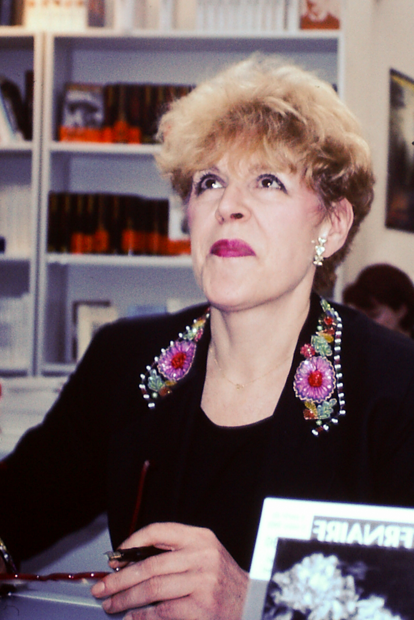 Portrait de Sylvie Joly au Salon du livre de Paris en 1993.